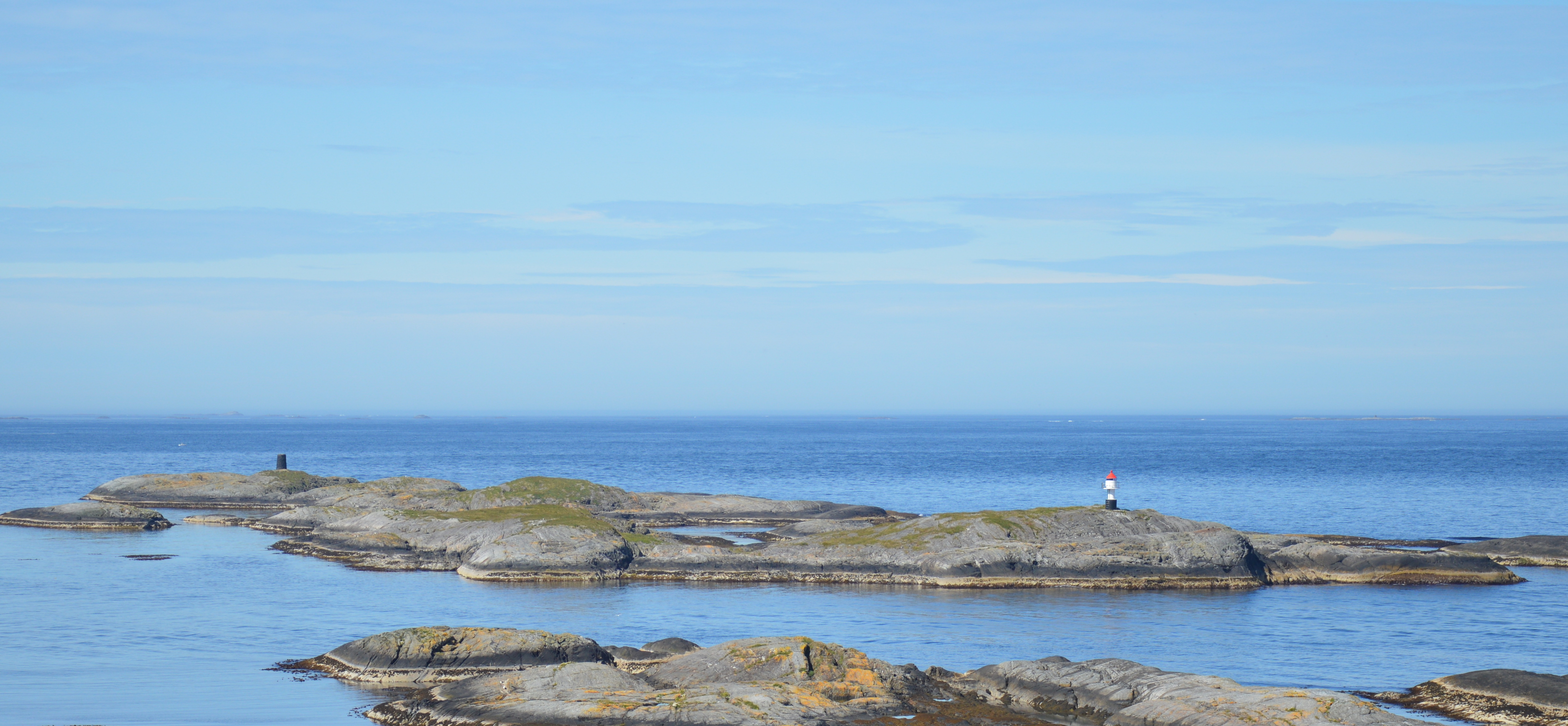 Nordre Odden